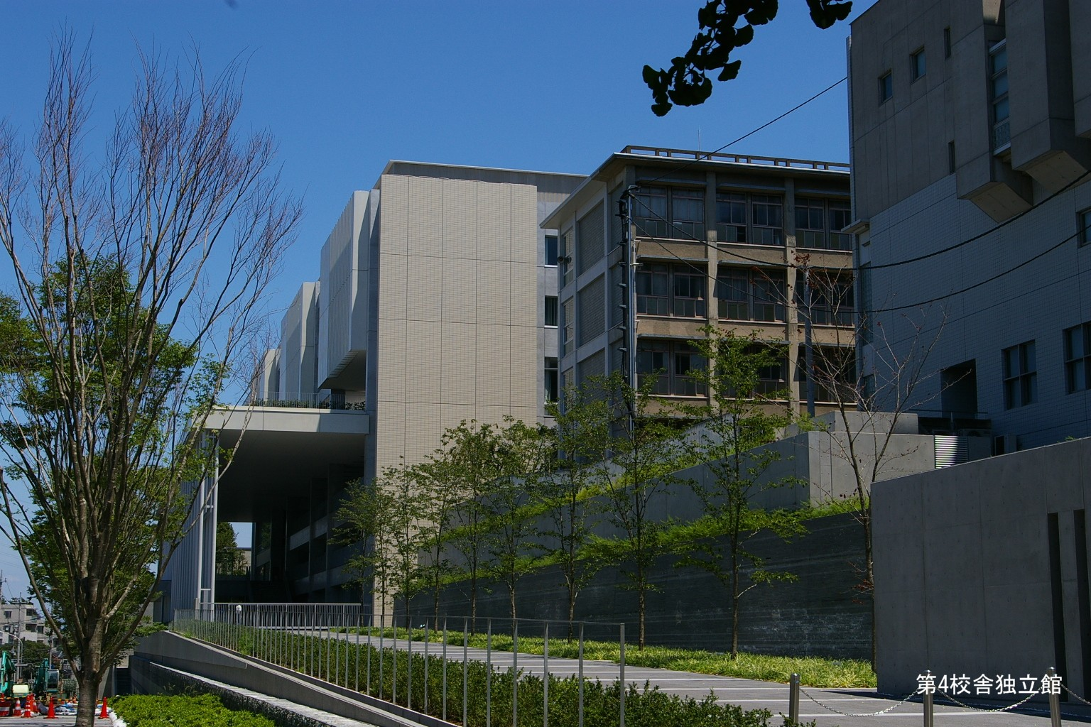 2009.5日本国内で塾生 (talk)が撮影。